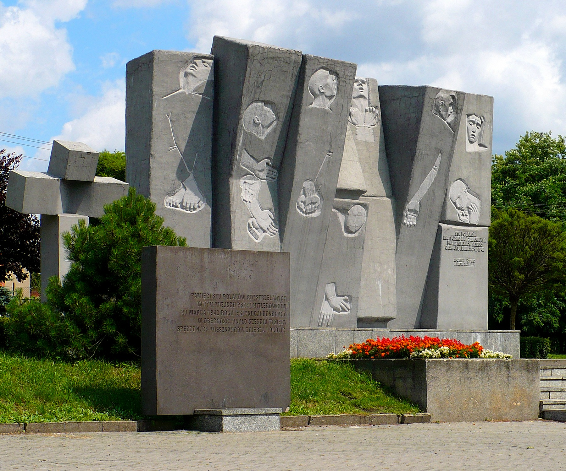 Pomnik na placu Stu Straconych w Zgierzu